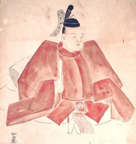 松浦信正の肖像。